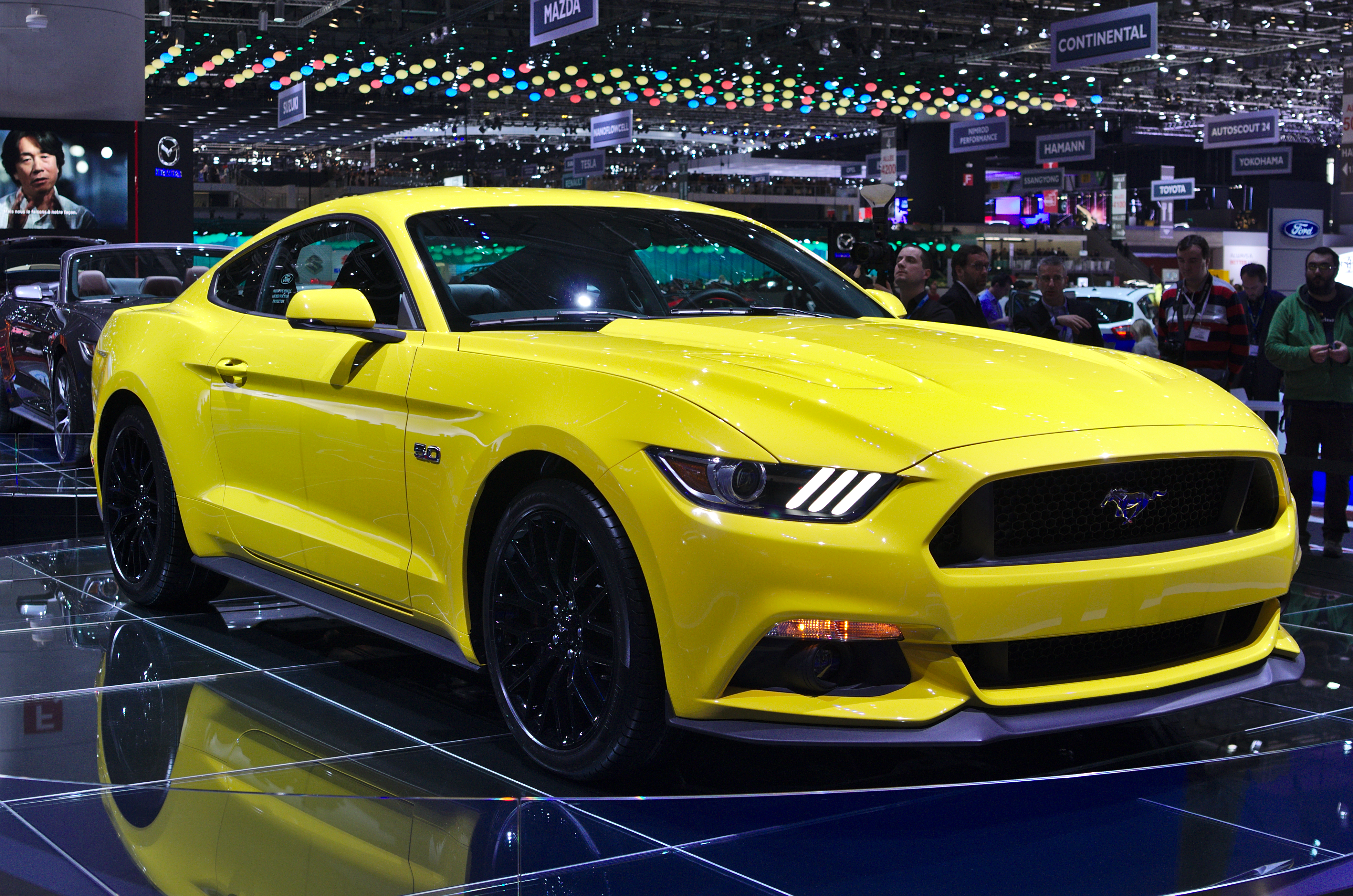 Salon de l'auto de Genève 2014 - 20140305 - Ford